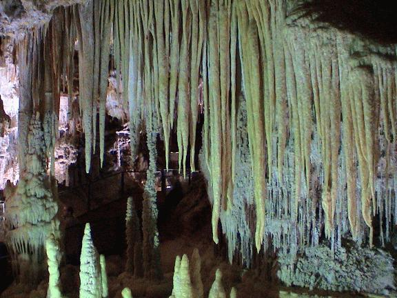 Photo prise à l'intérieur de la grotte de clamouse (hérault, France) 2004. Cevenol2